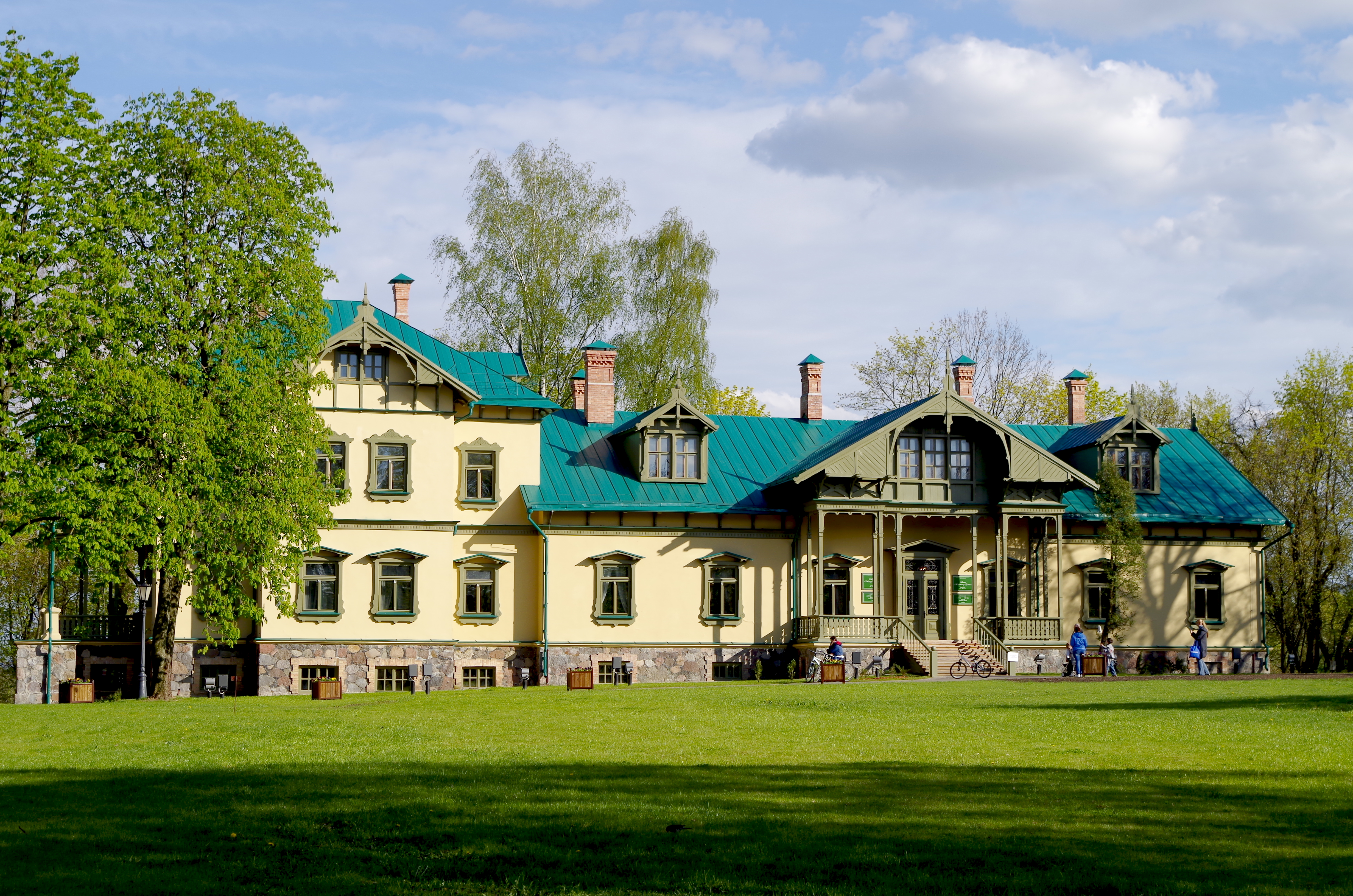 Minsk, Belarus